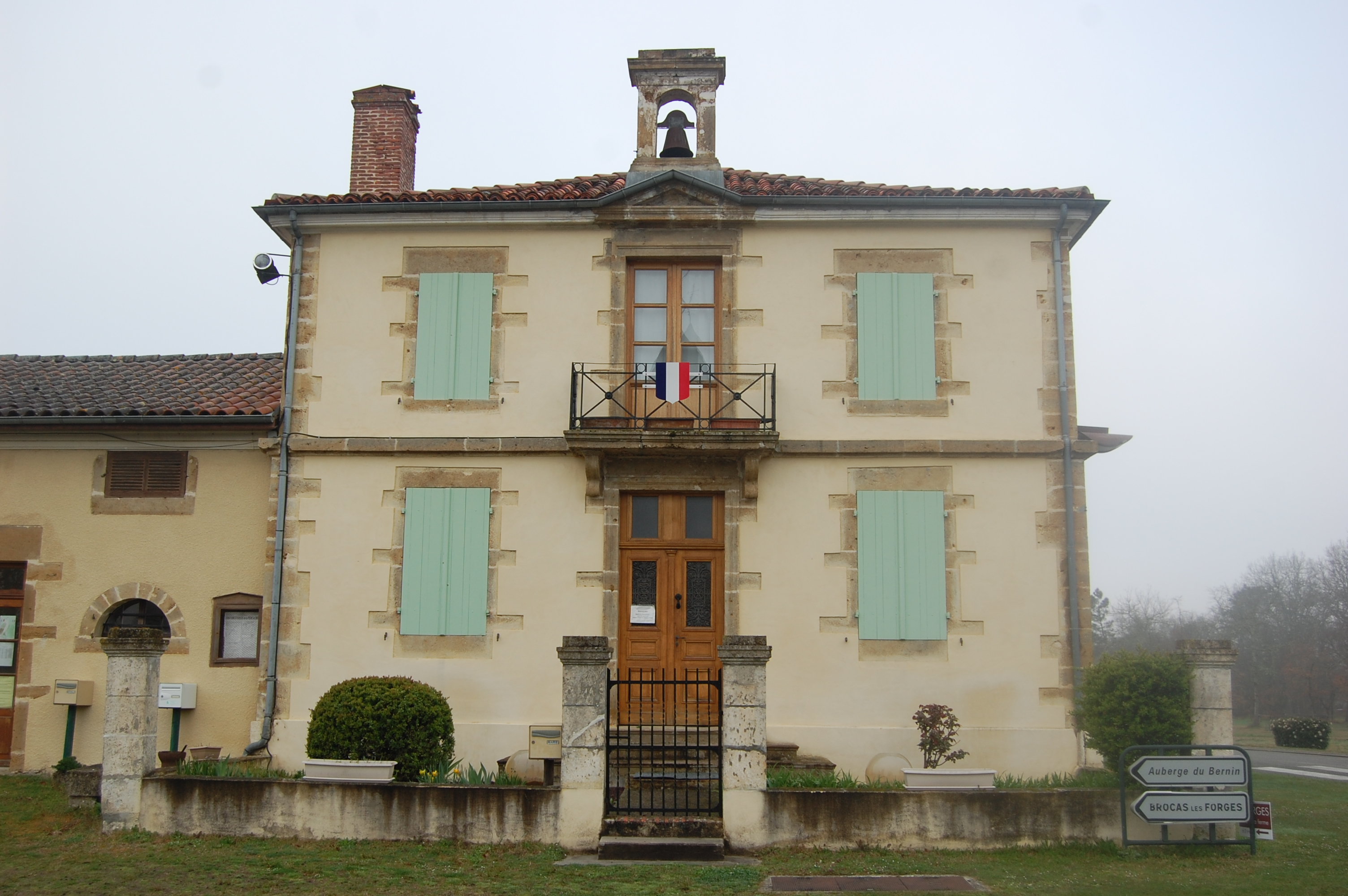 La mairie de Vert, Landes.